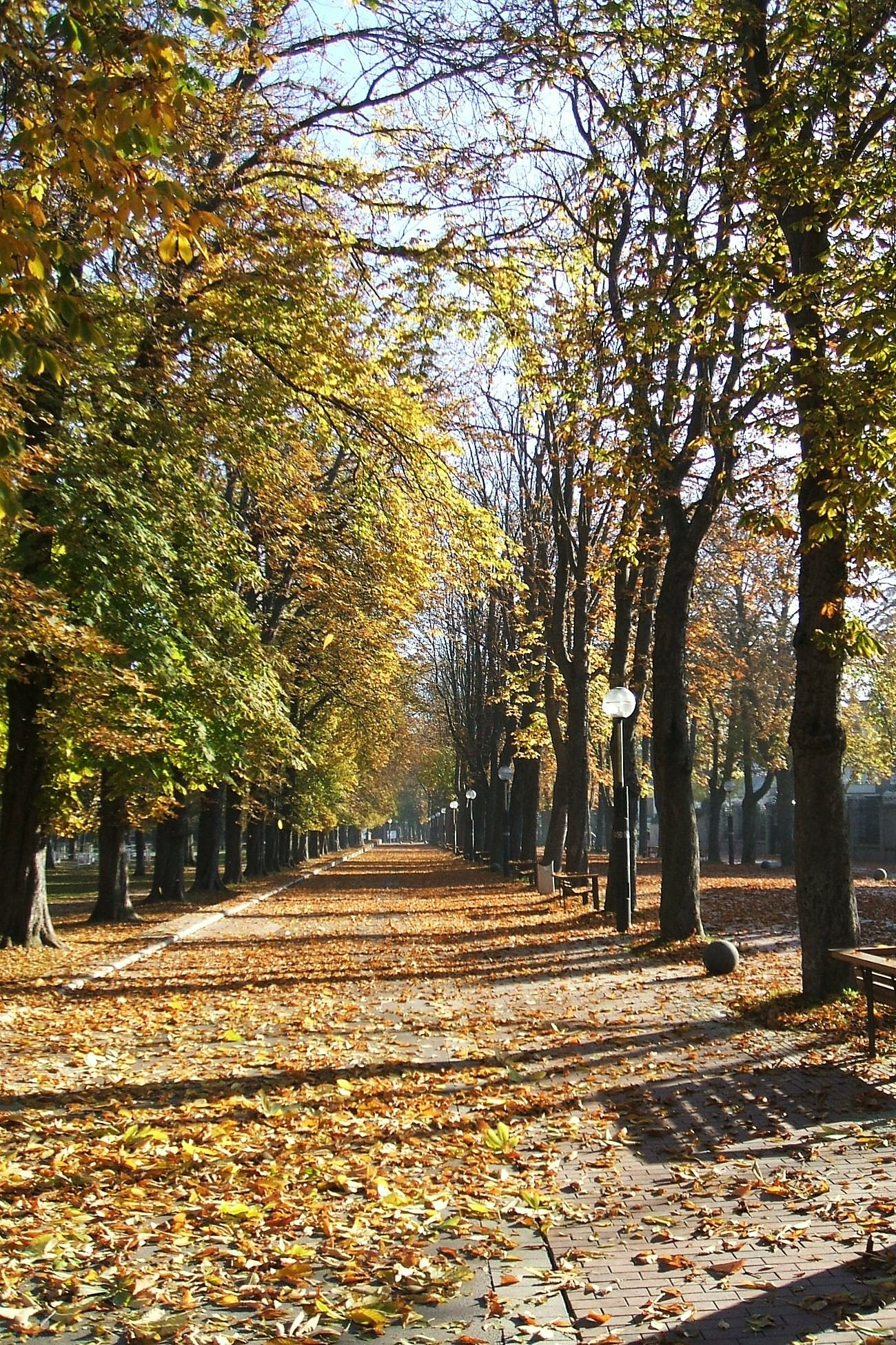 Paseo de Fray Francisco.